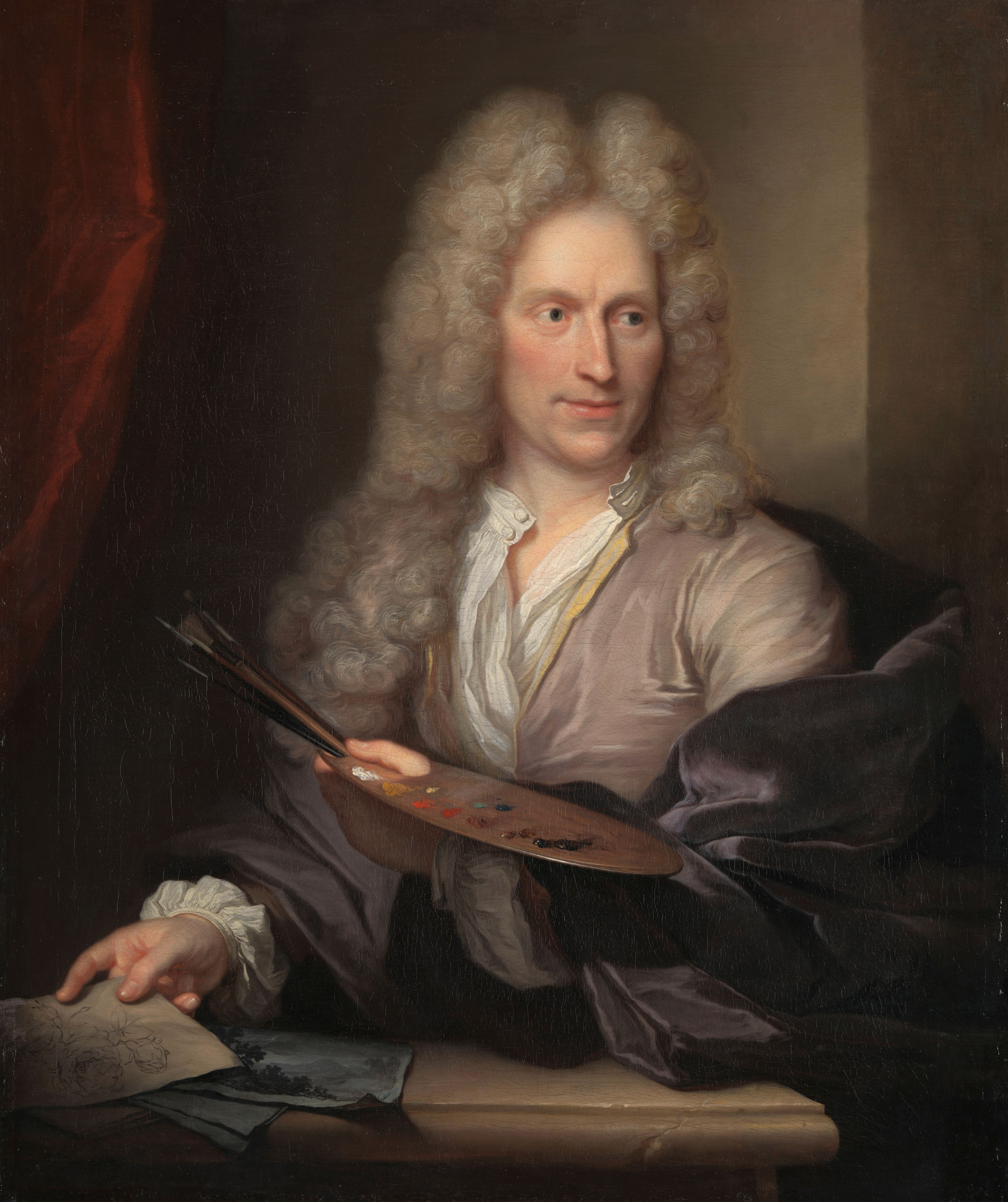 Een portret van de bloemstillevenschilder Jan van Huysum met palet en penselen in de linkerhand en een tekening van een bloeiende plant in zijn rechterhand. De schilder leunt tegen een balustrade waarop twee tekeningen liggen, de bovenste van een landschap. Van Huysum is gekleed in een wit, open onderhemd met daaroverheen een lila met geel gevoerd hemd. Een dieppaarse mantel is half om zijn schouders geslagen. Hij draagt een lange, wit bepoederde pruik. De schilder is naar links gekeerd maar kijkt naar rechts het beeld uit. Links een dieprood gordijn.; Arnold Boonen (1669-1729), olieverf op doek, ca. 1720